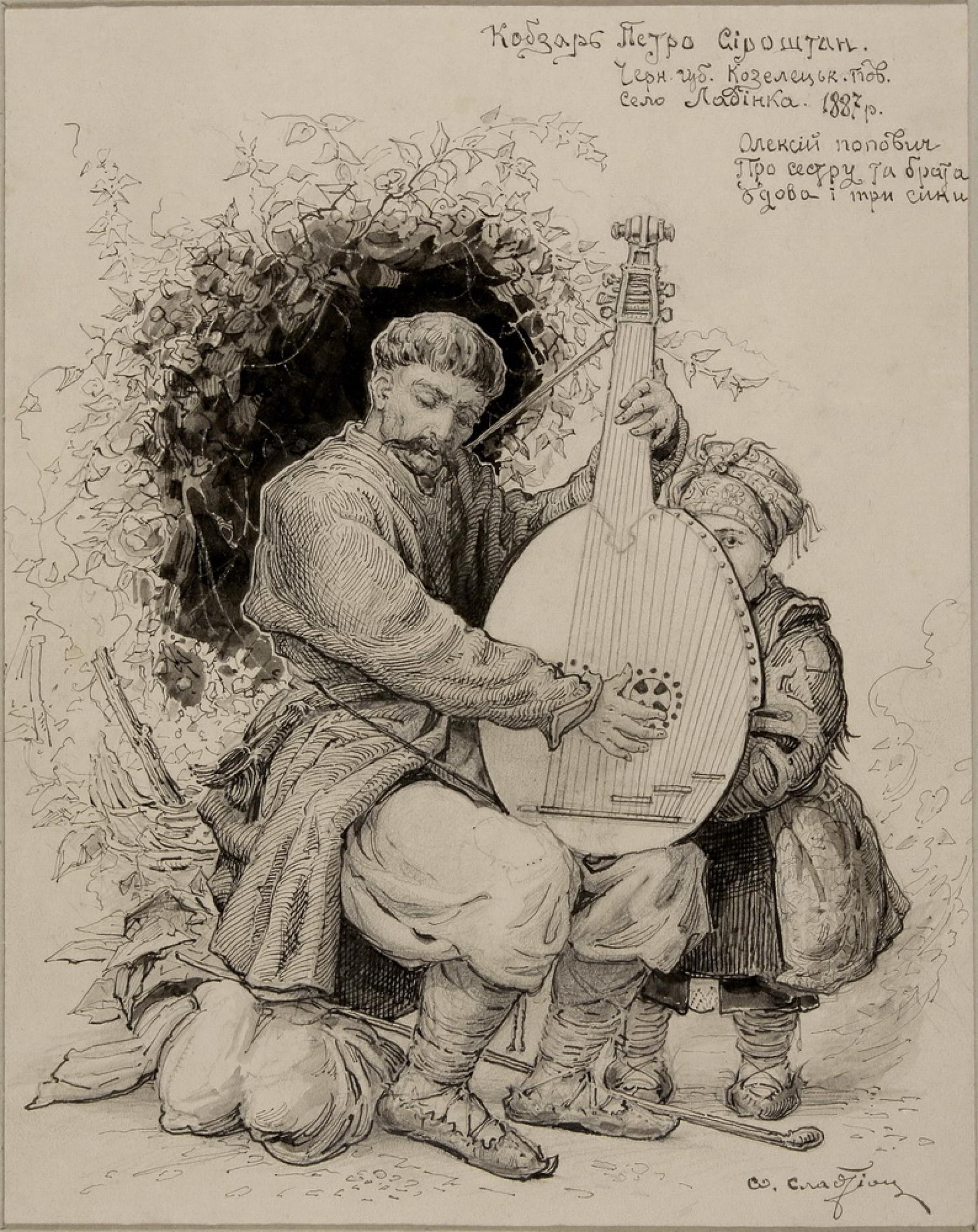 ПОРТРЕТ КОБЗАРЯ ПЕТРА СІРОШТАНА 1887 р., туш, перо, олівець; 25,7 x 20,3 Вгорі праворуч напис: Кобзар Петро Сіроштан Черн[ігівська] губ[ернія], Козелецьк[ий] пов[іт], село Ладінка, 1887 р. Олексій Попович Про сестру та брата Удова і три сини». Внизу праворуч авторський підпис.